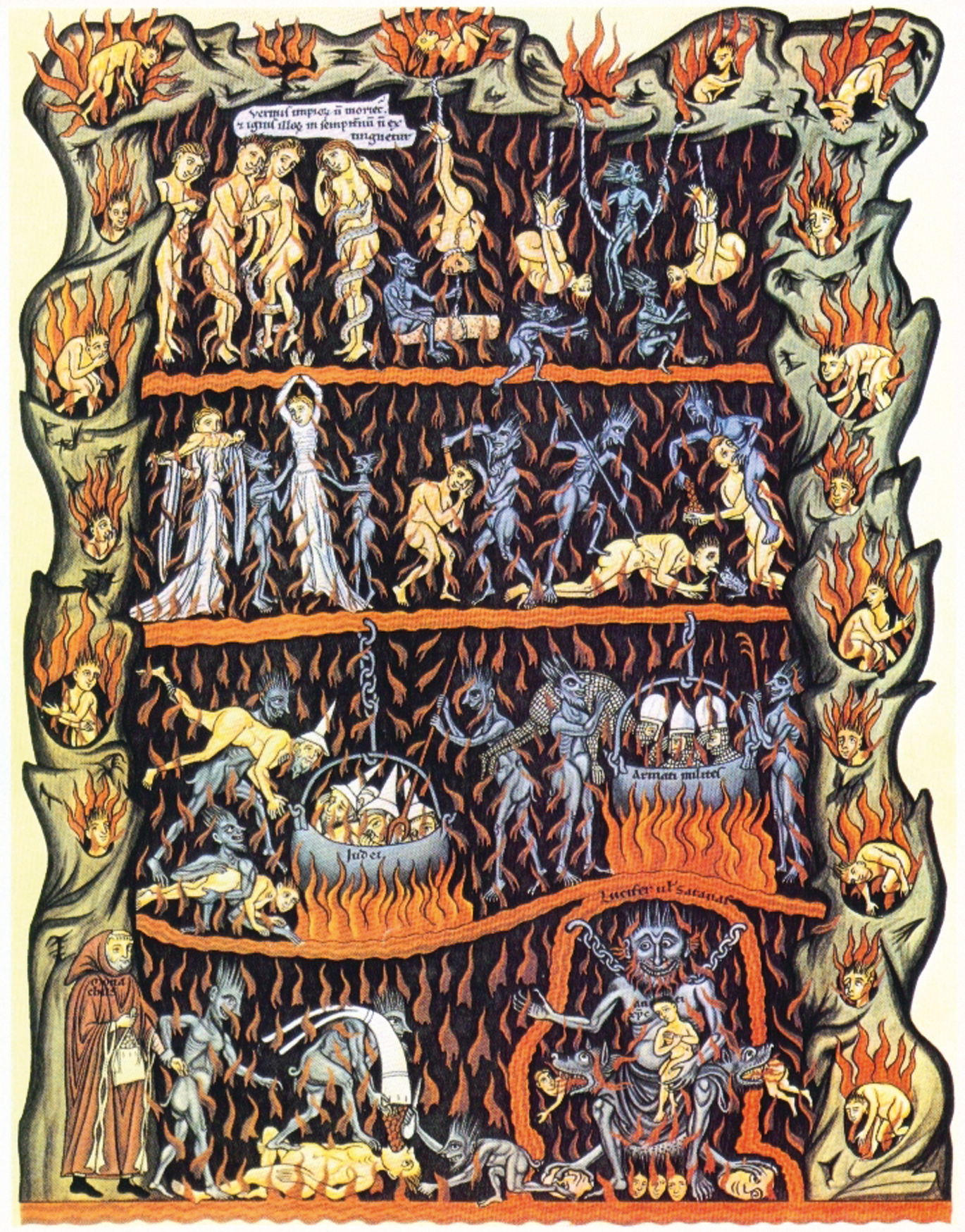 باغ لذات - جهنم